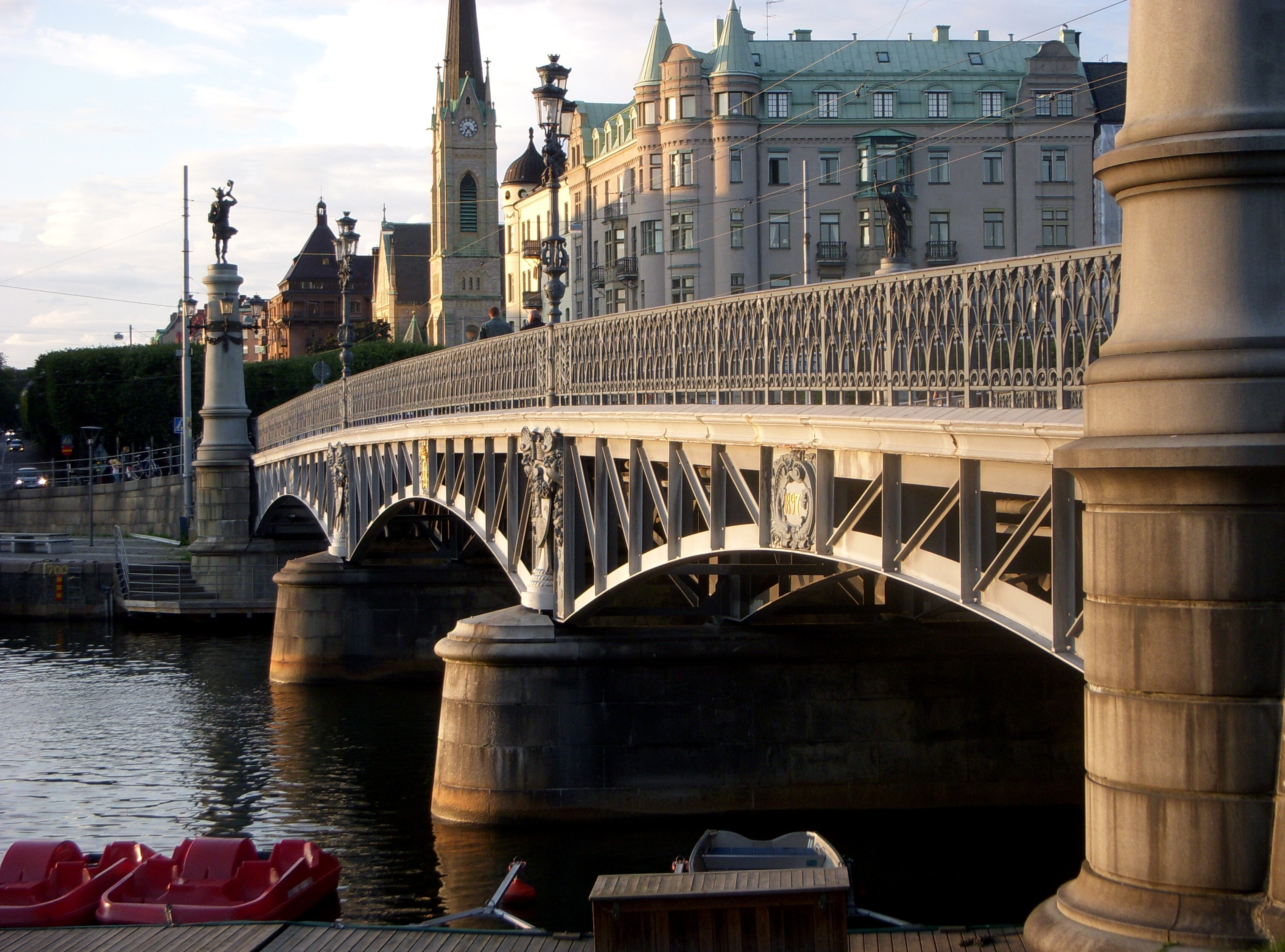 Djurgårdsbron i Stockholm